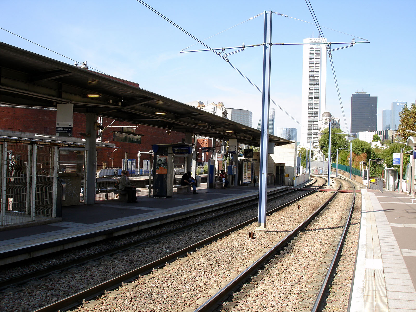 Les voies du T2 vues en direction de La Défense. Gare de Puteaux, Hauts-de-Seine, France.